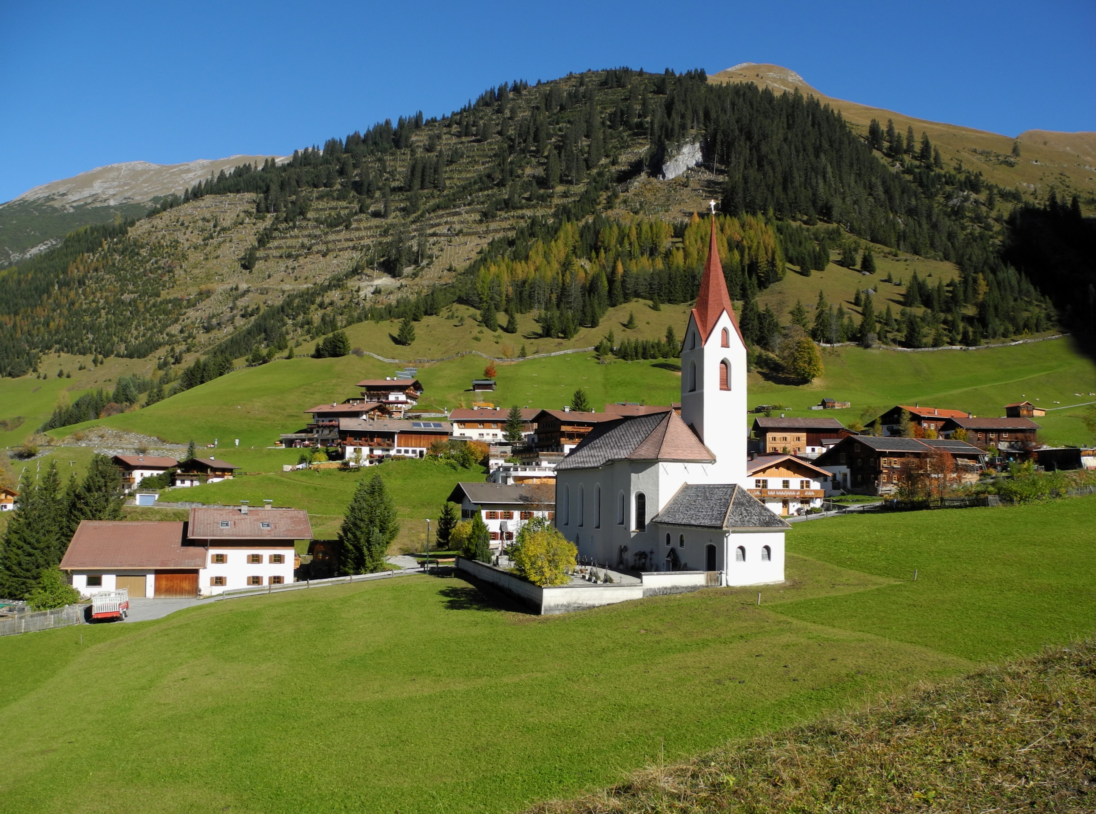 Gramais - Ort mit Seitekopf